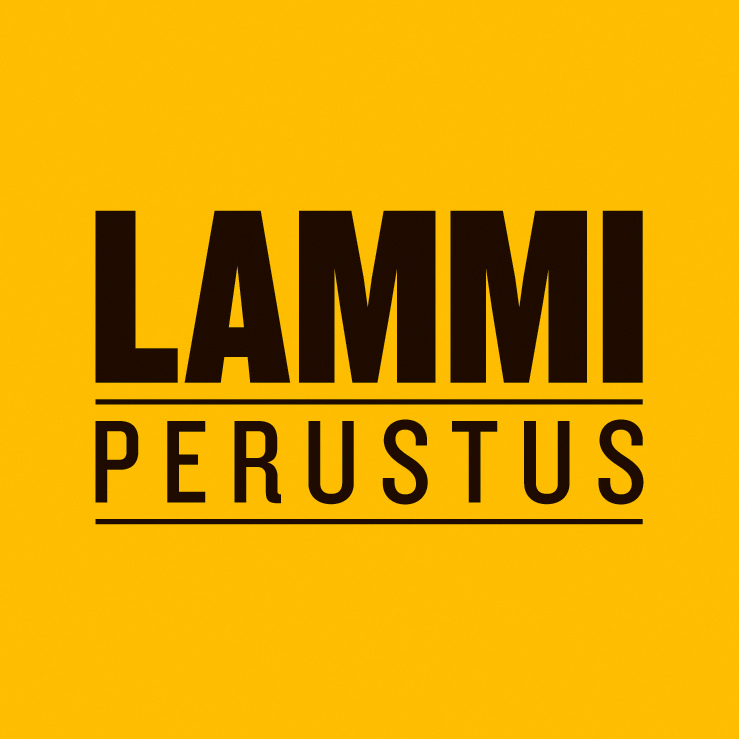 Lammi-Perustuksen logo